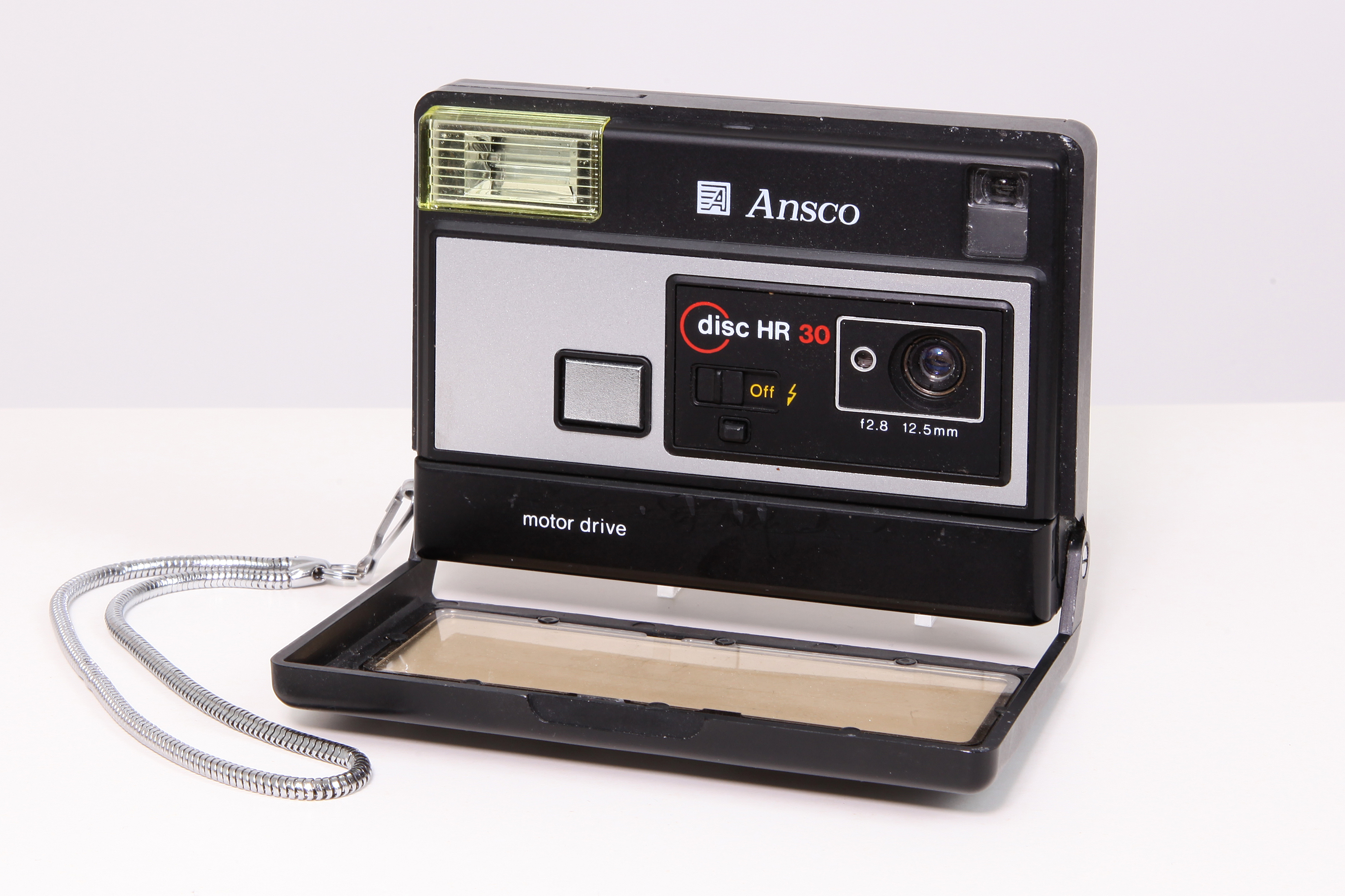 Disc-Kamera, Fotoapparat Ansco Disc HR 30, Vorderseite geöffnet